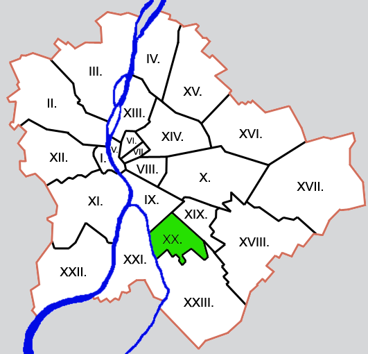 Budapest kerületei: XX. kerület